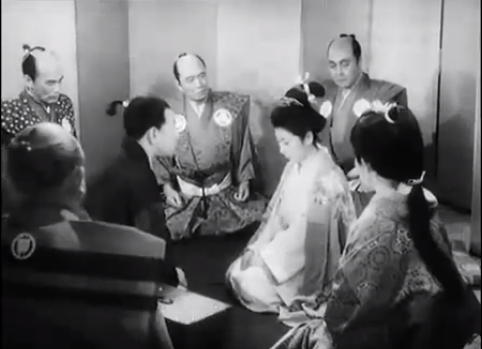 『西鶴一代女』、1925年